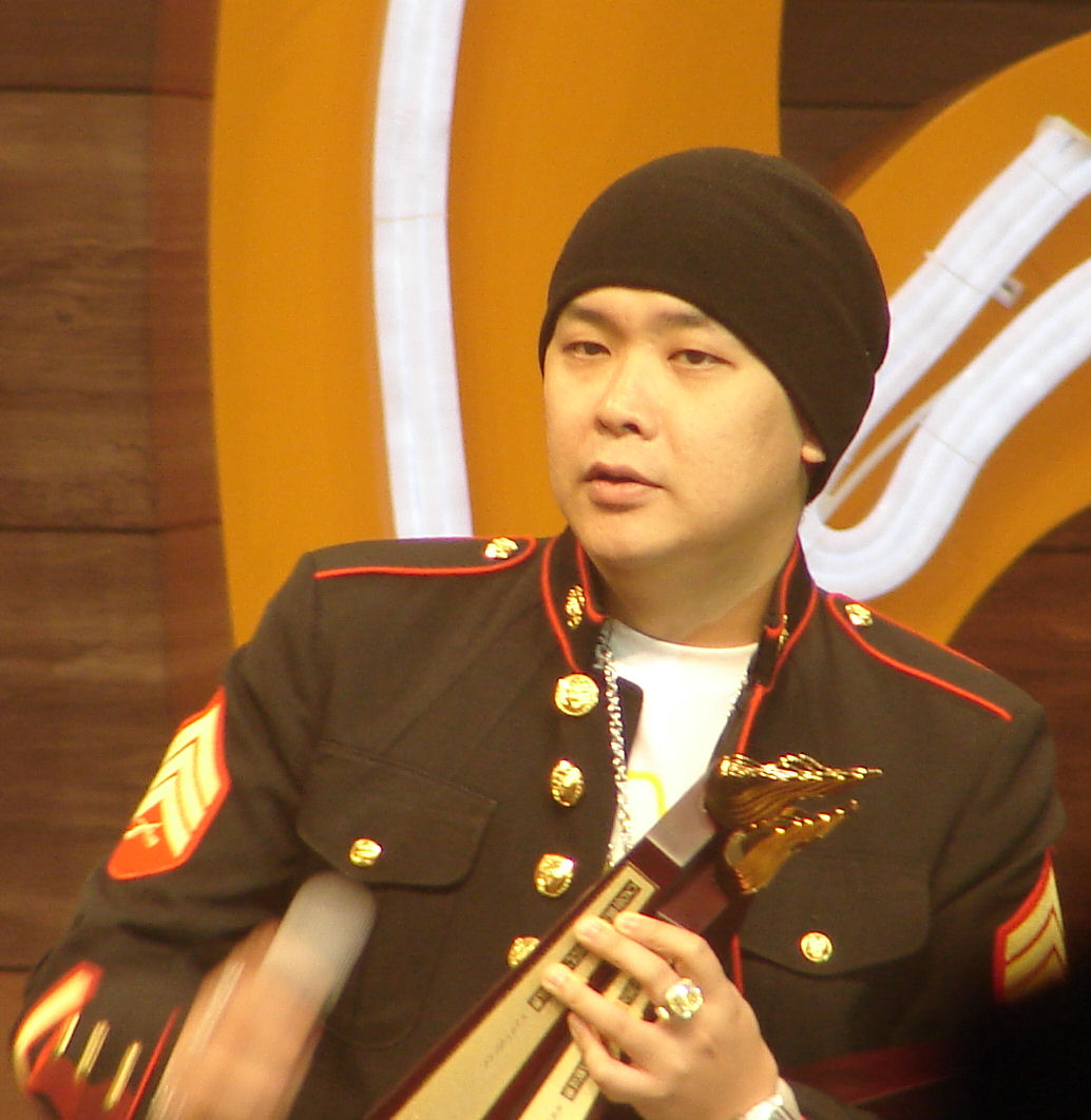 Mark Lui 雷頌德@叱o宅903 - 2006 (01 January 2007)